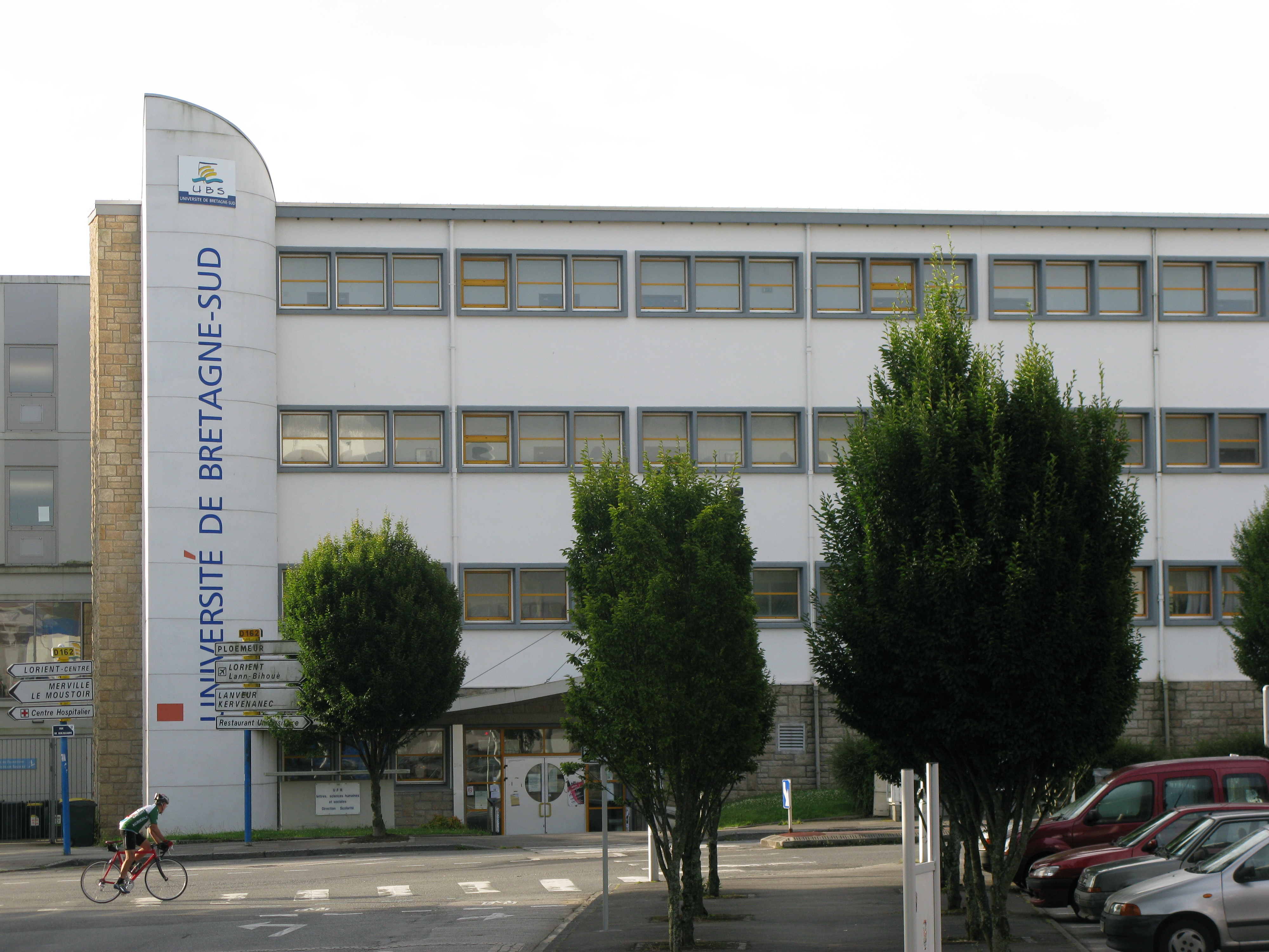 Université de Bretagne Sud à Lorient, entrée du bâtiment des humanités.